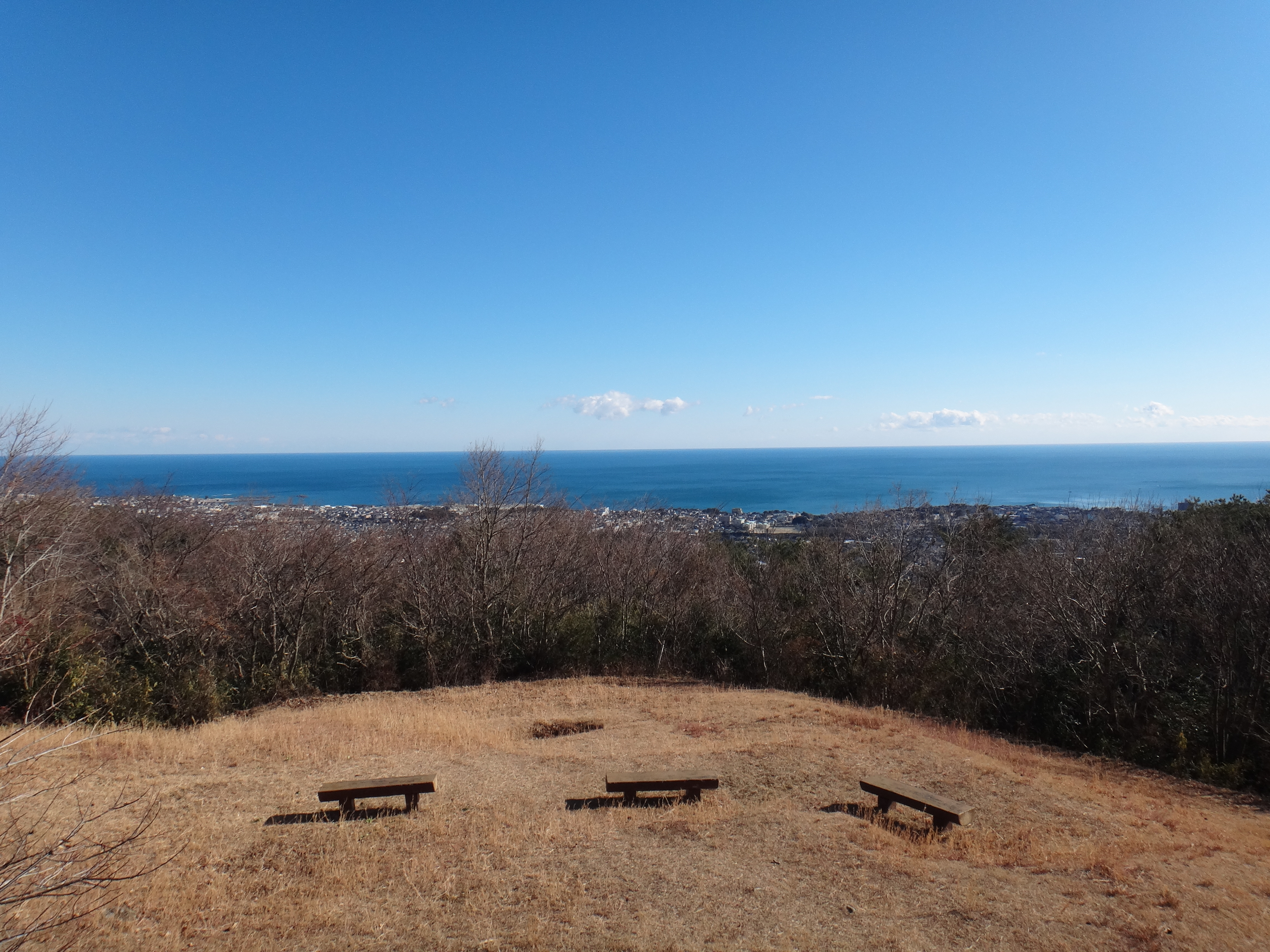 風神山直下から日立港を眺める